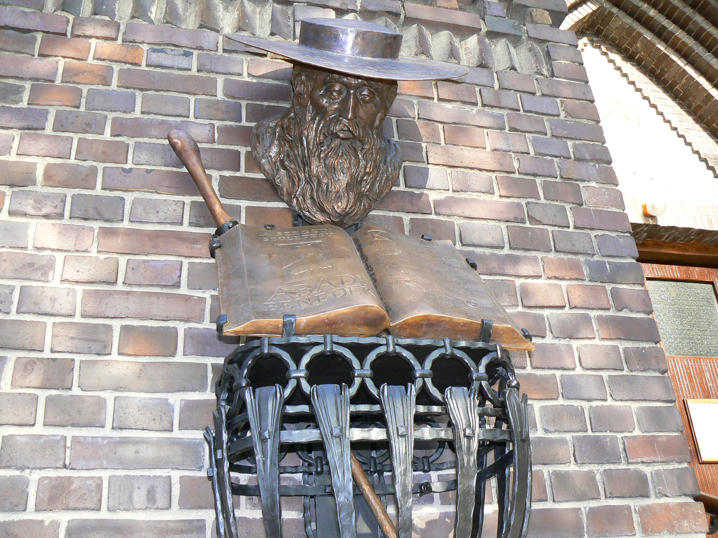 Lapis András: Abádi Benedek bronz mellszora Szegeden. Lapis András alkotása (2008)